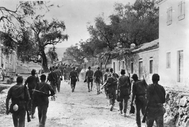 [Textbeschreibung aus Bestand "Bild 183"] In überraschendem Handstreich landeten, wie der Bericht des Oberkommandos der Wehrmacht kürzlich meldete, deutsche Einheiten auf der von Badoglio-hörigen Truppen besetzten Insel Korfu und nahmen sie nach kurzem, heftigen Kampf in Besitz, wobei zahlreiche Gefangene und Kriegsmaterial in ihre Hände fielen. - UBz: deutsche Truppen auf dem Vormarsch gegen die Stadt Korfu Bei Abdruck nennen: PK-Kriegsberichter Cuno (Sch) Herausgabedatum: 15.10.43